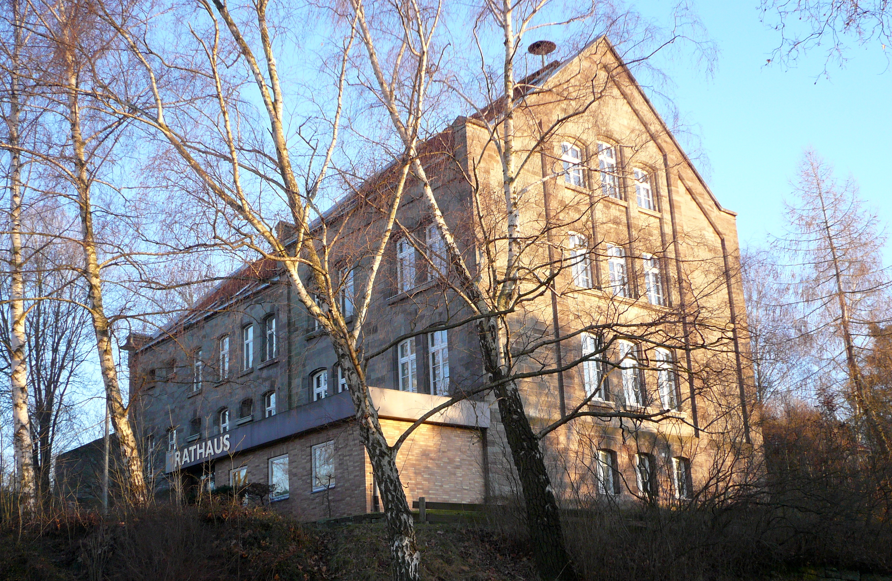 Ehemaliges Amtshaus des Amtes Reinhausen, heute Rathaus der Gemeinde Gleichen, Landkreis Göttingen, Südniedersachsen. Erbaut 1864-68